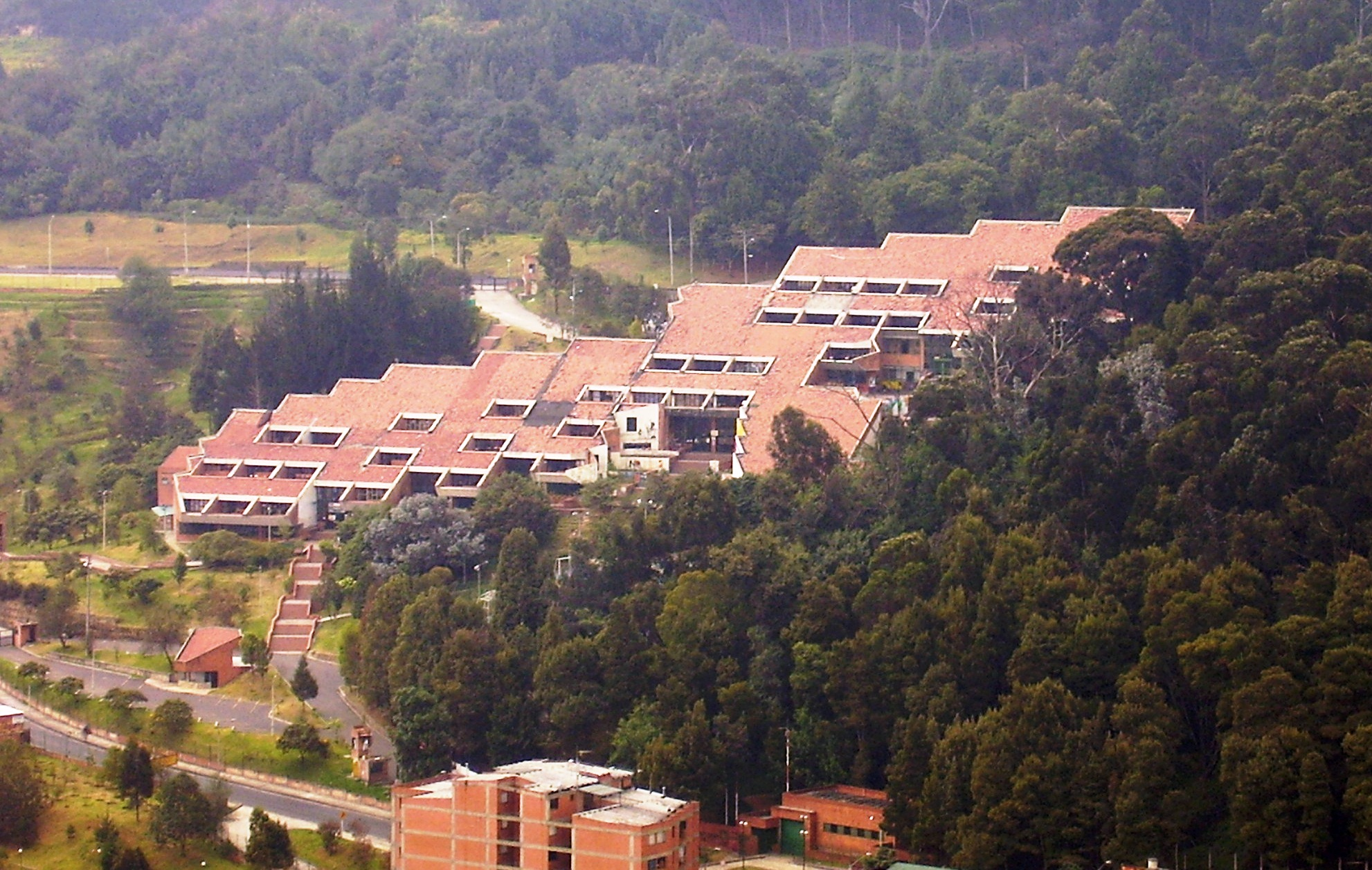 Complejo académico de la Universidad Distrital Francisco José de Caldas, sede Macarena, antes de la construcción del edificio Macarena B.